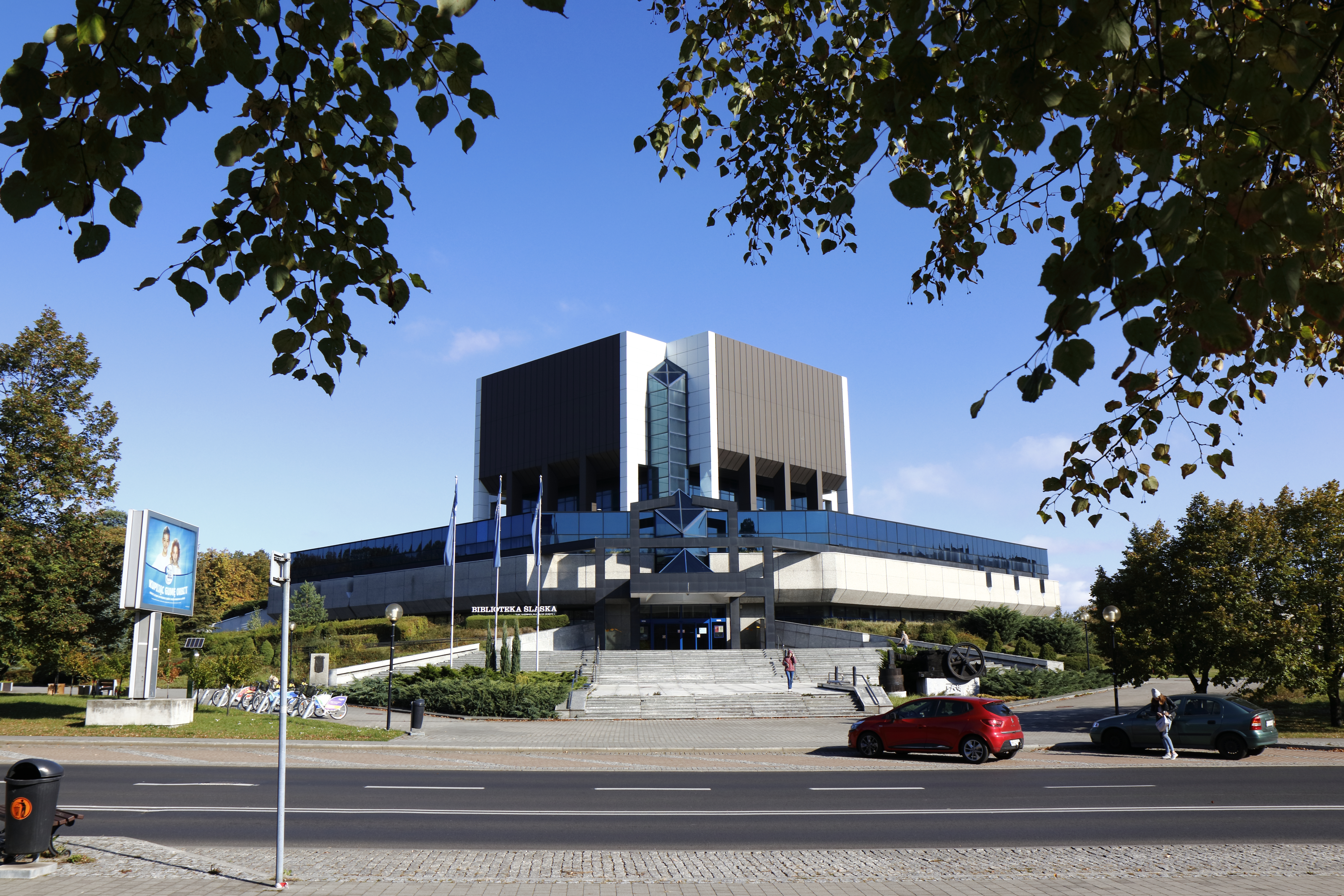 Budynek Biblioteki Śląskiej